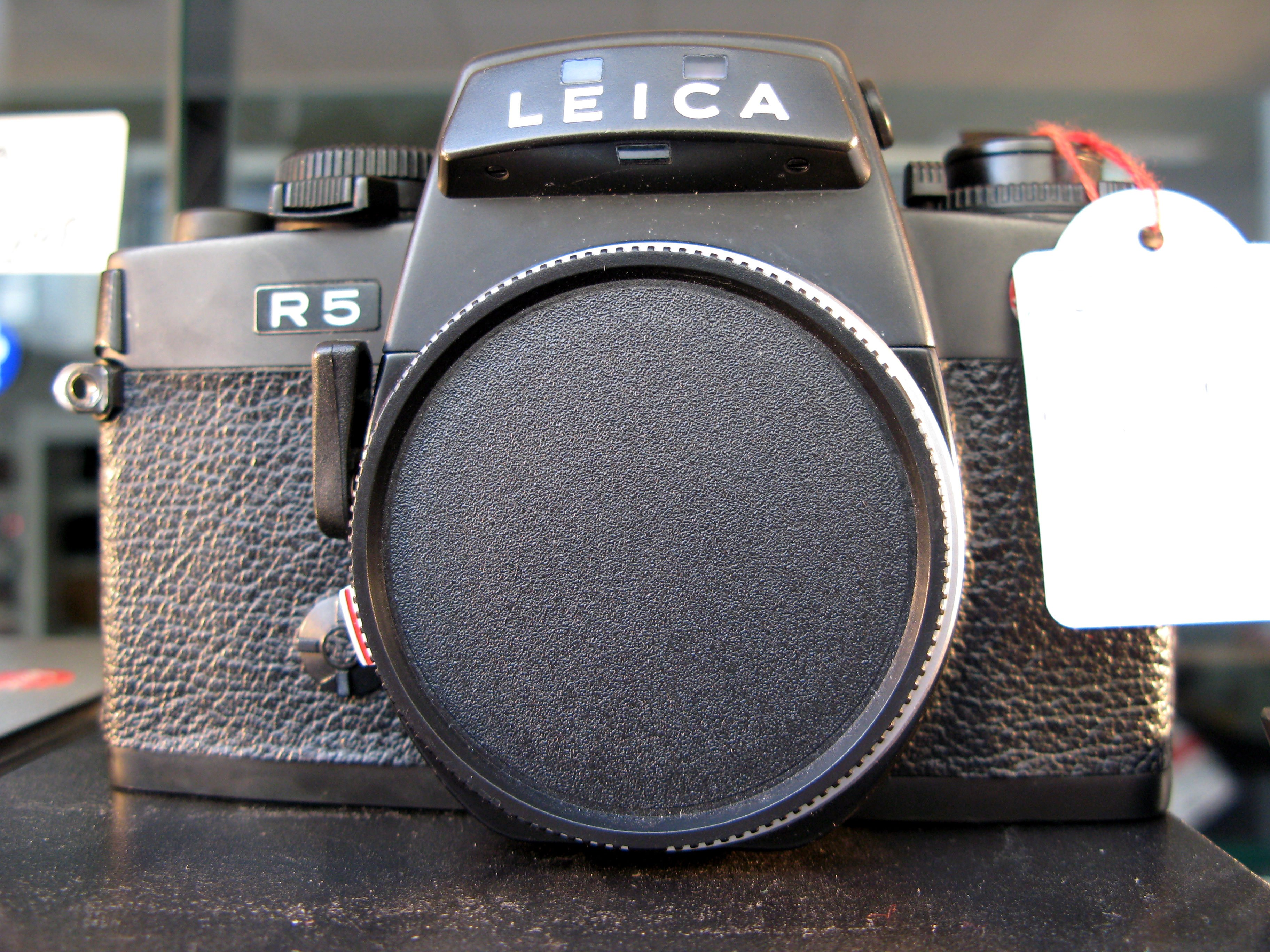 Leica R5